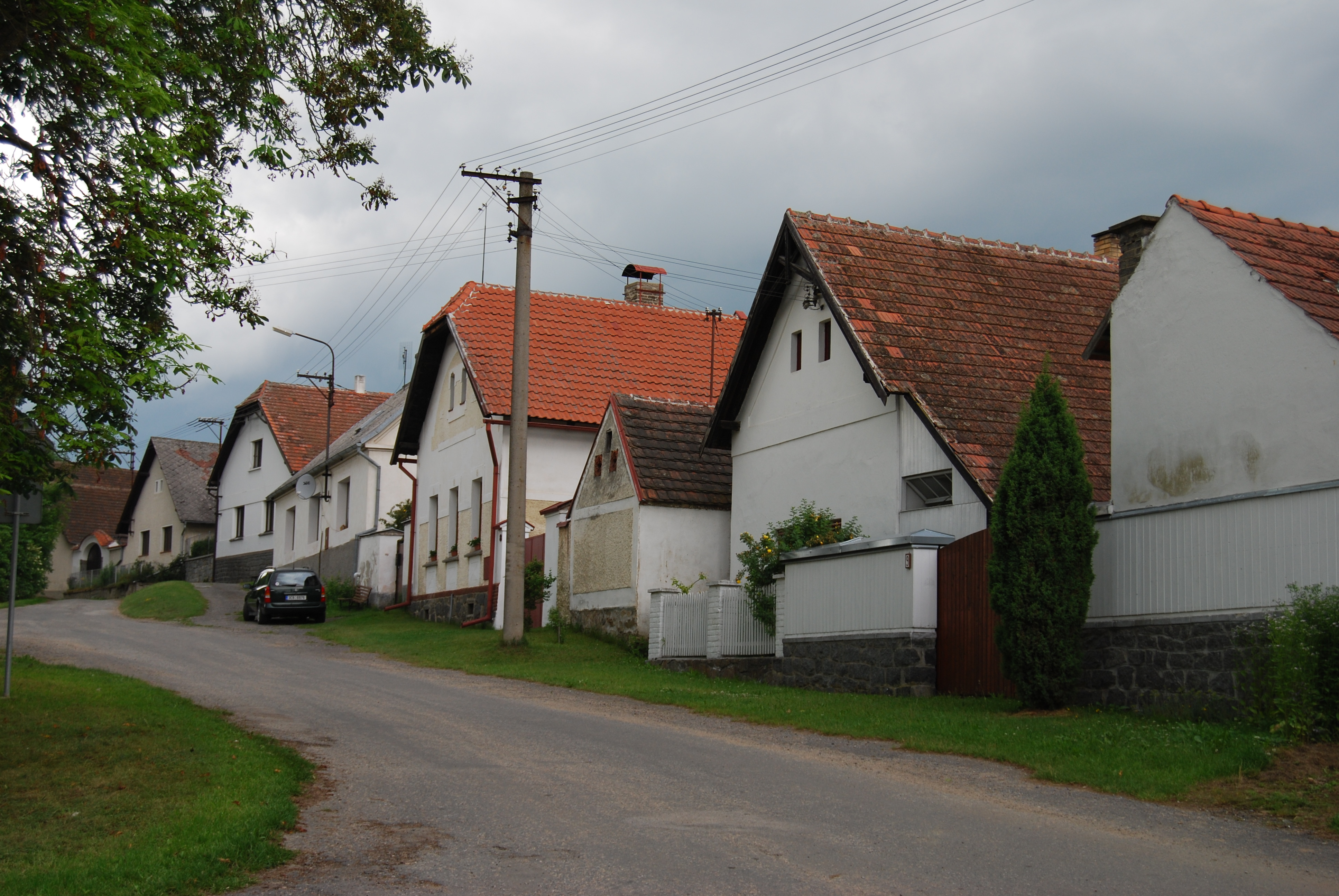 Usedlost čp. 8 a 9 na severní straně návsi v obci. Krsice je část obce Čimelice v okrese Písek. Česká republika.